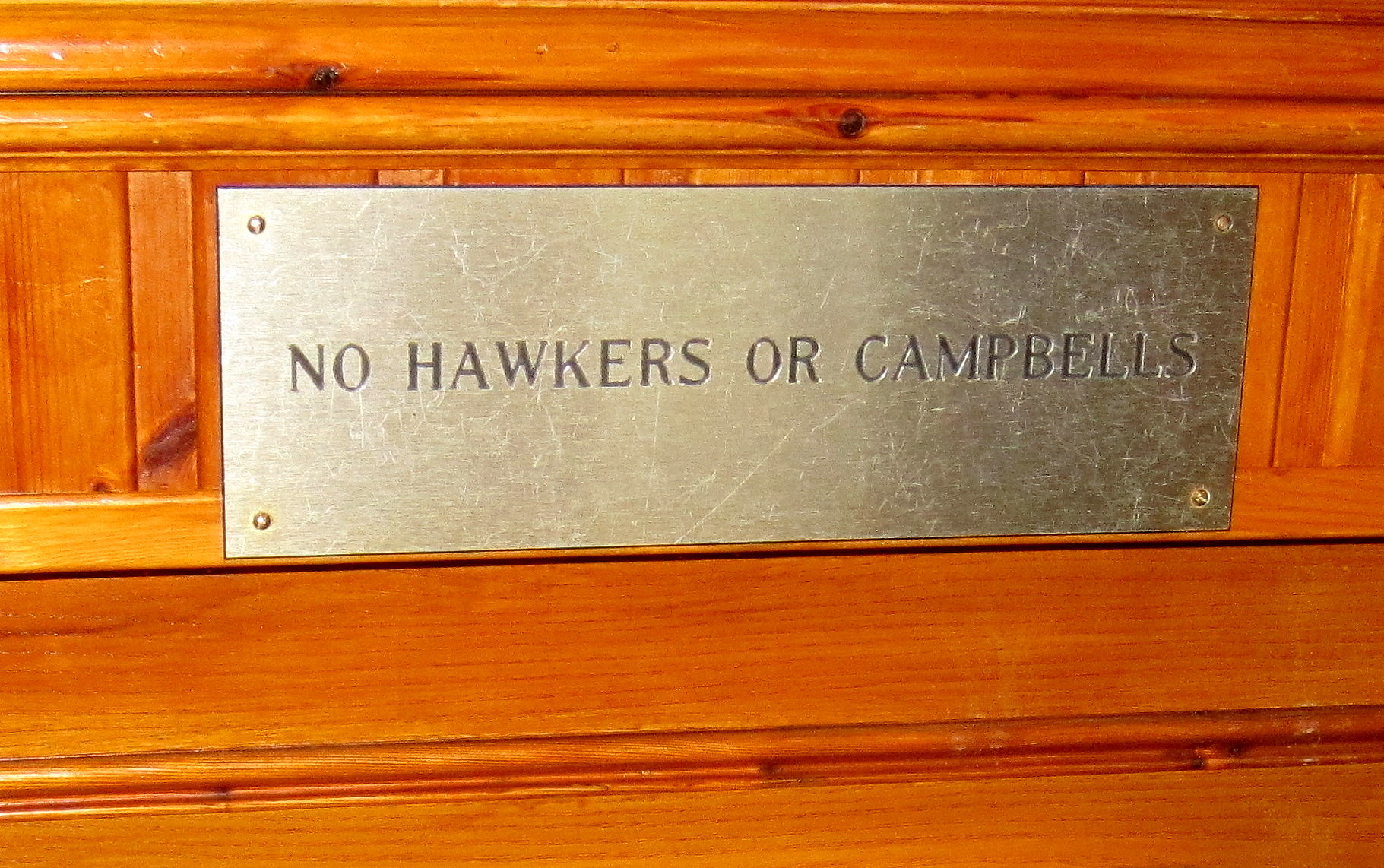 Clachaig Inn bord dat de toegang verbiedt aan leurders en Campbells, Schotland